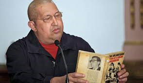 Chavez leyendo Historia de la Nación Latinoamericana